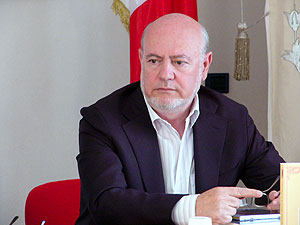 Michele Castelli è linguista e scrittore italiano